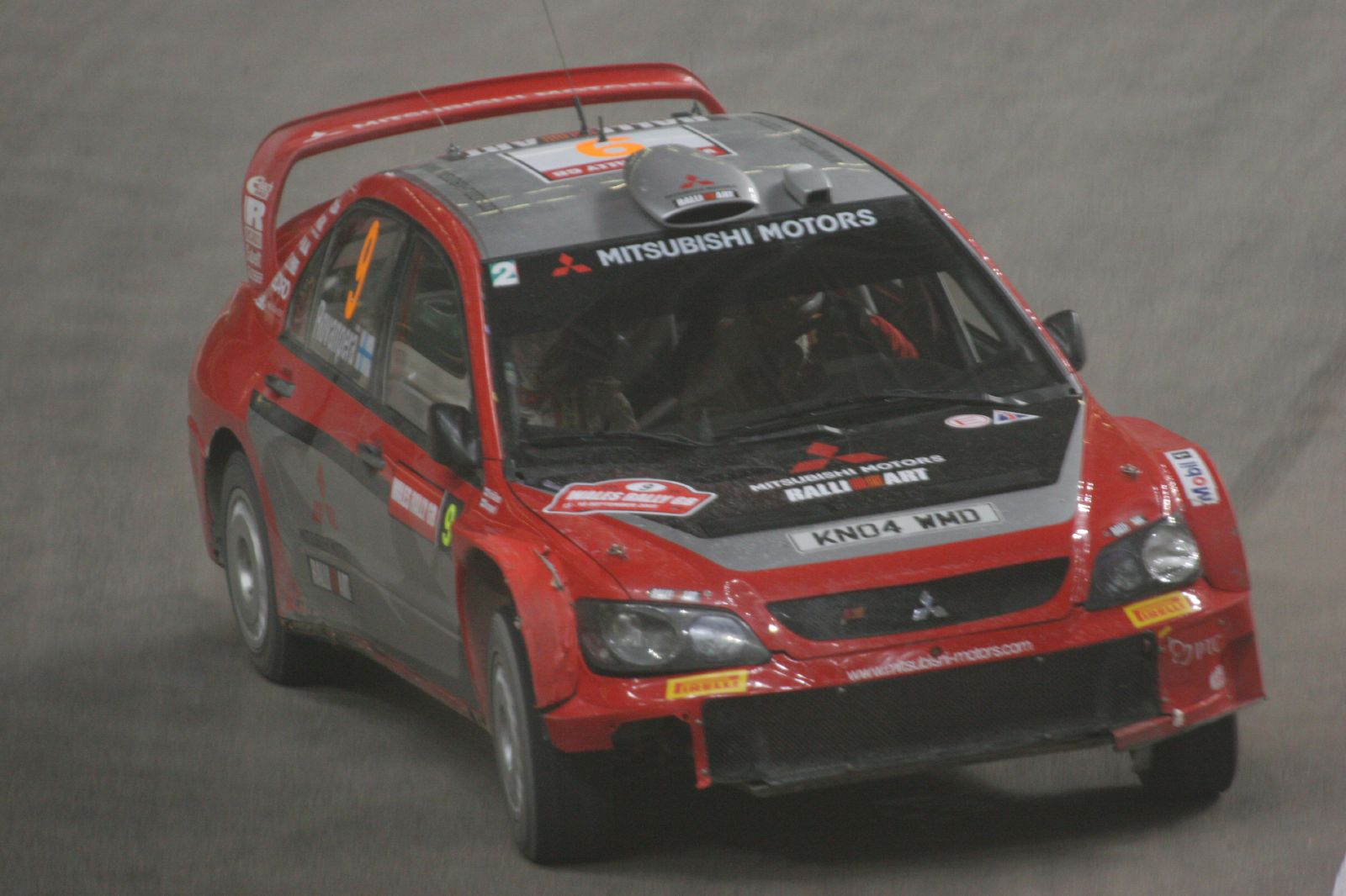 Harri Rovanperä driving a Mitsubishi.